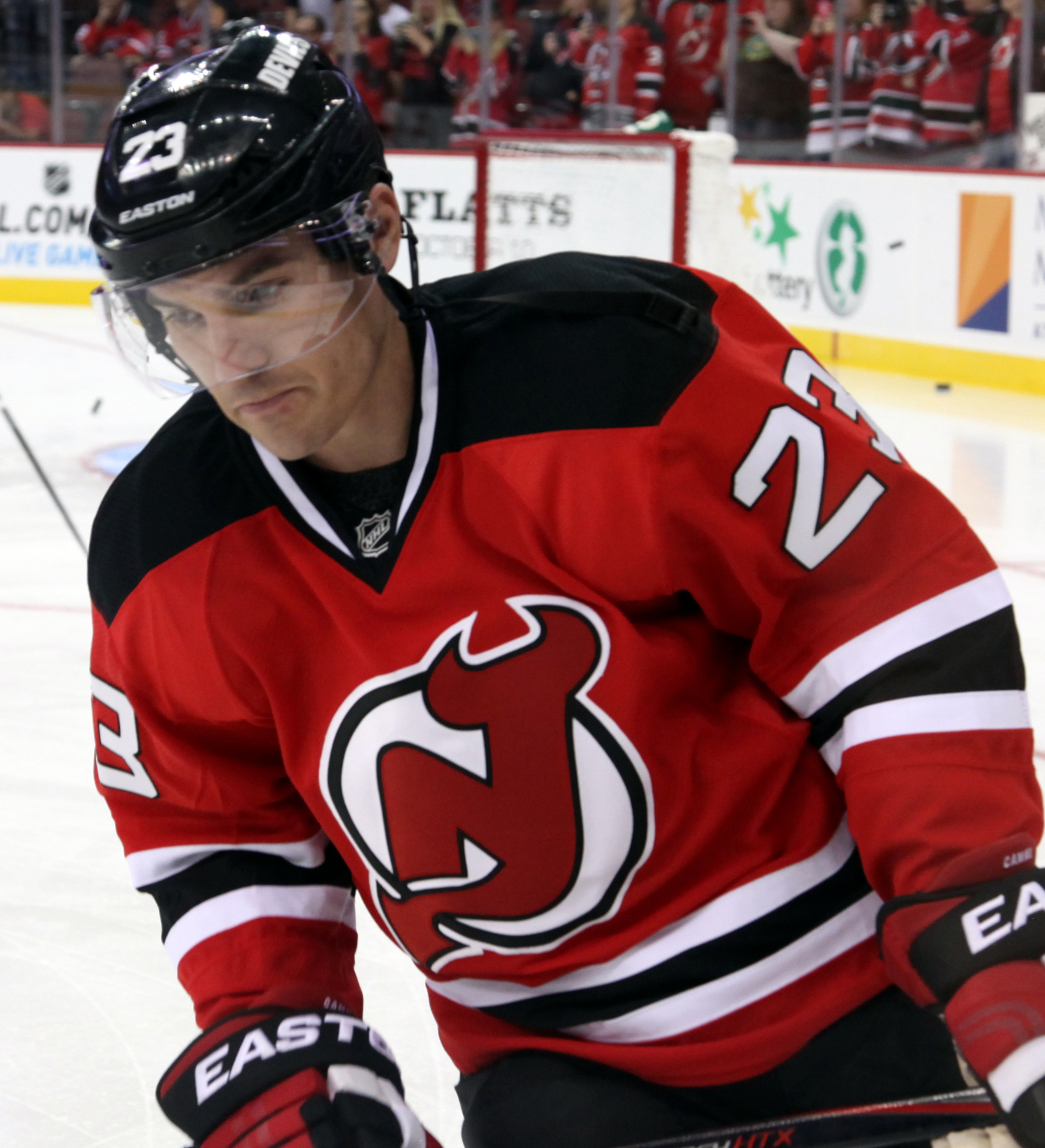 IMG_3840 Cammalleri in September 2014.